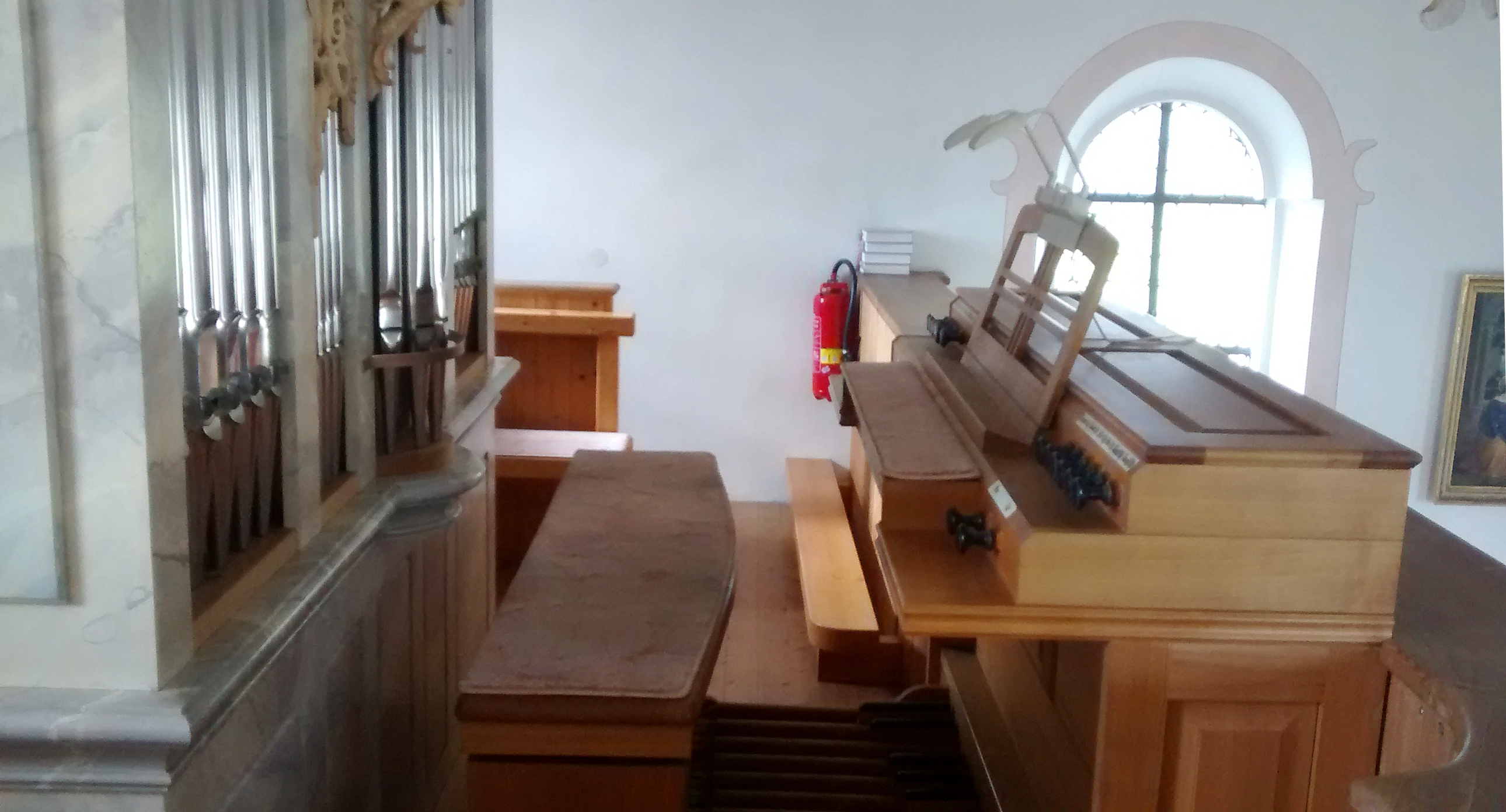 Organ of Heilig Kreuz (Mindelaltheim)